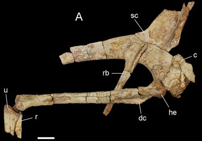 Pectoral and forelimb of Deltadromeus (SGM-Din 2; Ministère de l'Énergie et des Mines, Rabat, Morocco). Scale bar: 5 cm.